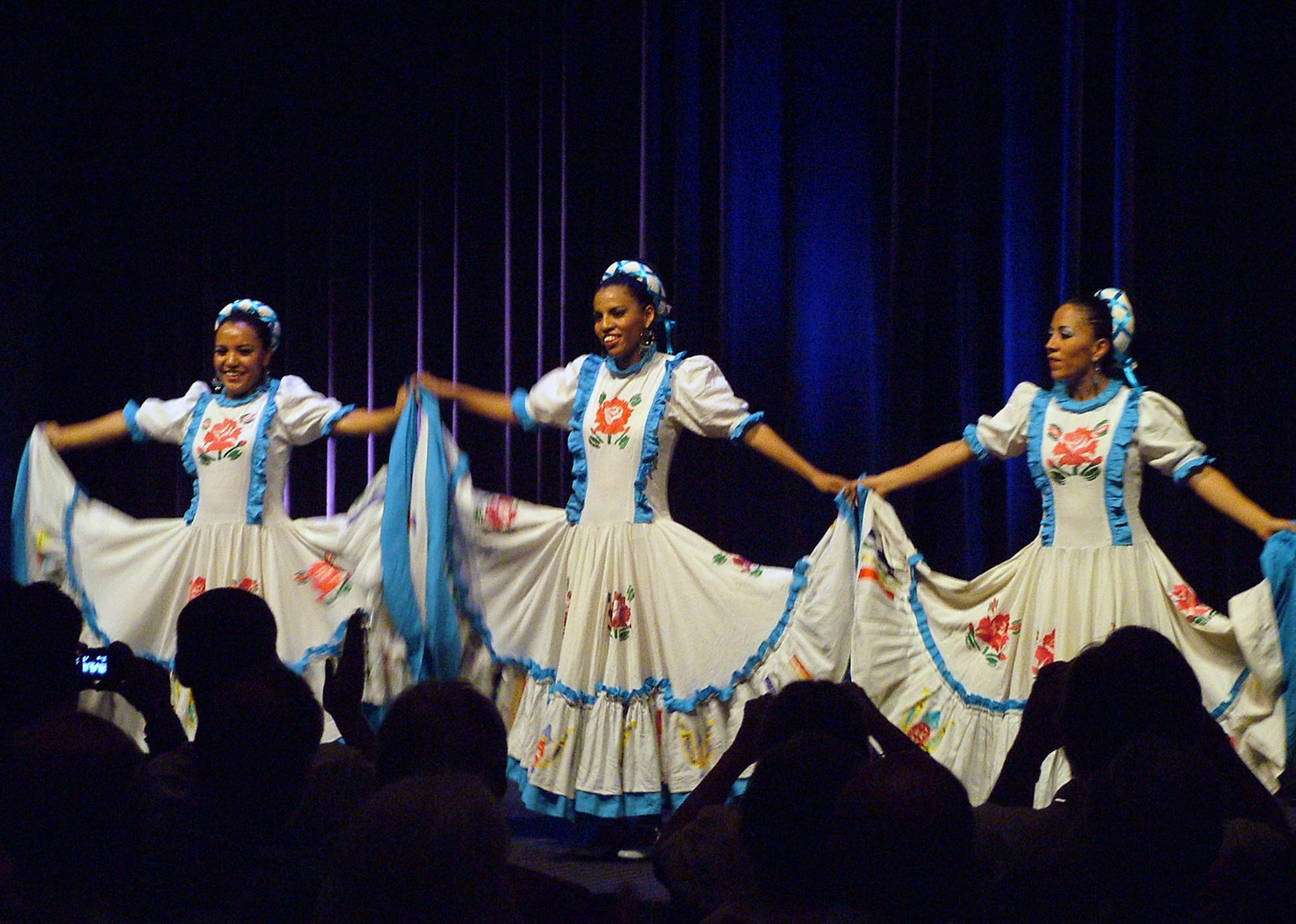 Universala Kongreso de Esperanto, Roterdamo 2008. Internacia Arta Vespero.